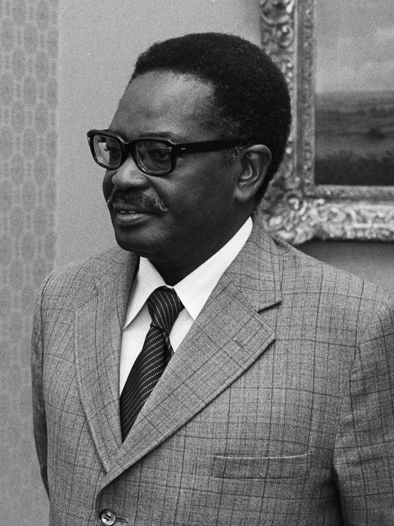 Collectie / Archief : Fotocollectie Anefo Reportage / Serie : [ onbekend ] Beschrijving : President MPLA, heer Neto door Den Uyl ontvangen; premier Den Uyl en A. Neto (r) Datum : 3 april 1975 Trefwoorden : premiers, presidenten Persoonsnaam : A. Neto, Uyl, Joop den Fotograaf : Mieremet, Rob / Anefo Auteursrechthebbende : Nationaal Archief Materiaalsoort : Negatief (zwart/wit) Nummer archiefinventaris : bekijk toegang 2.24.01.05 Bestanddeelnummer : 927-8518